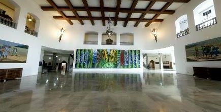 Palácio Bandeirantes, São Paulo